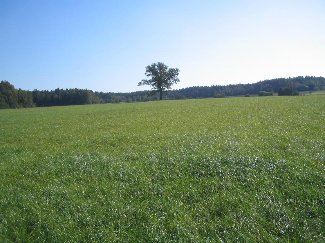 Gailaičių pievos